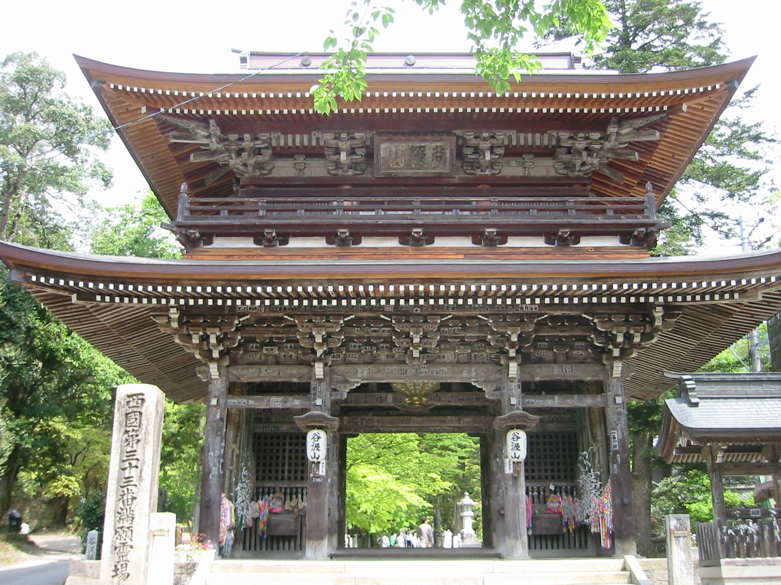 谷汲山華厳寺